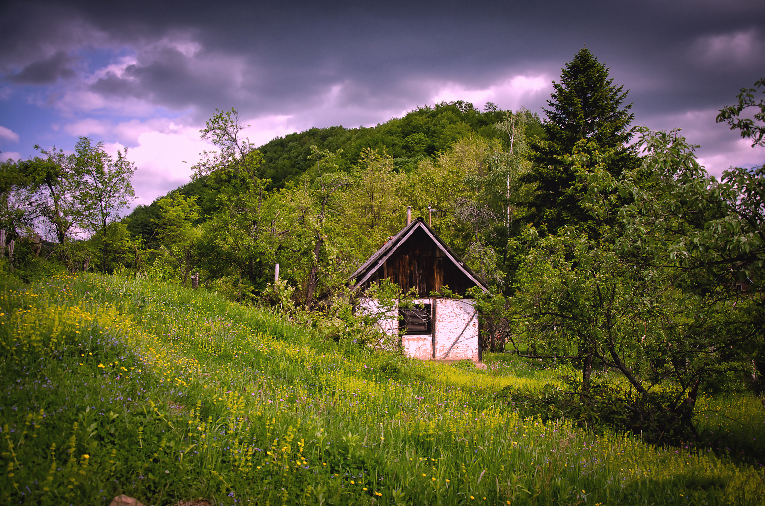 Парк природе Бања Врућица са околином, Теслић ID добра: PPP016